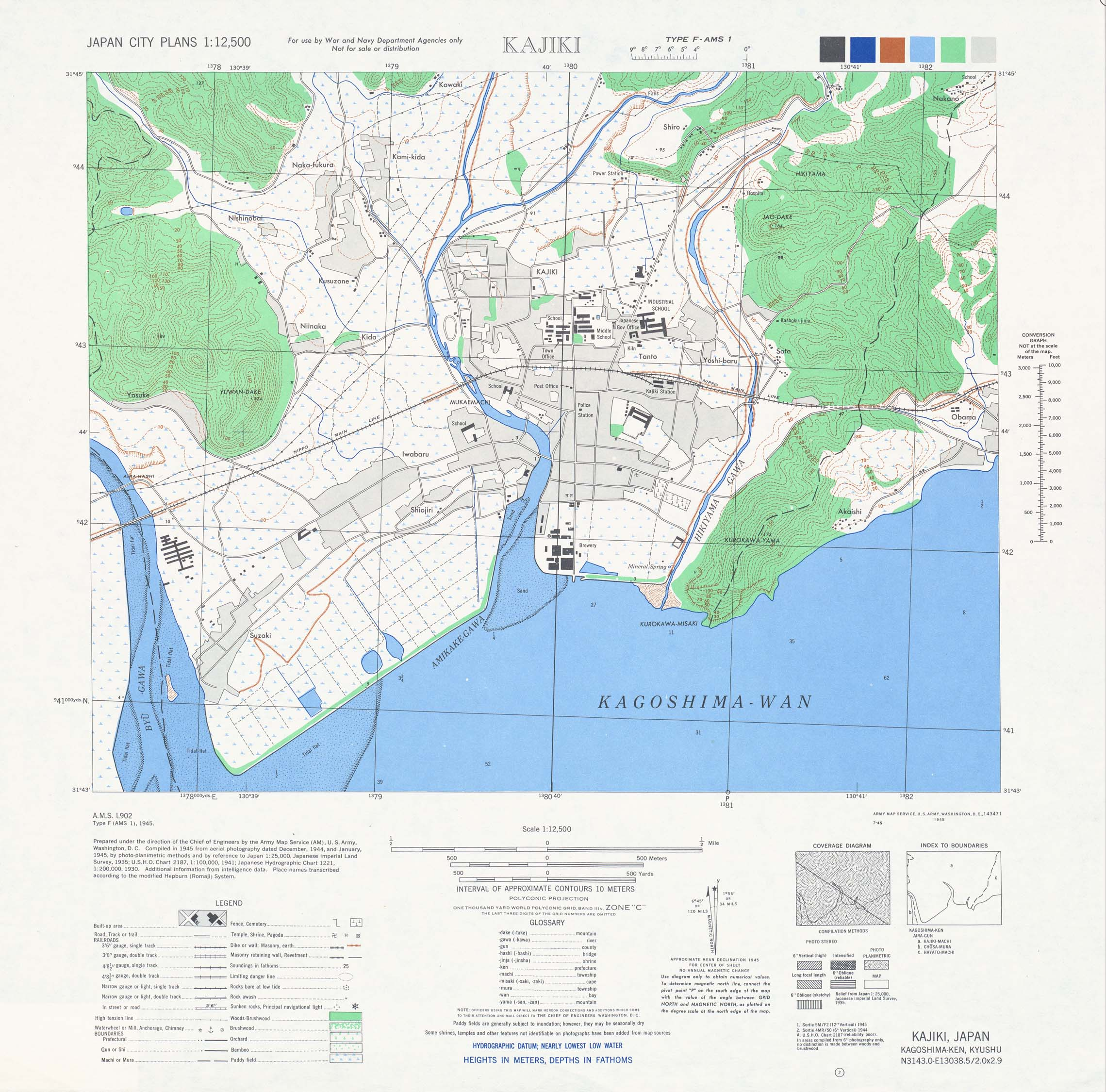 1946年ごろの鹿児島県姶良郡加治木町の地図